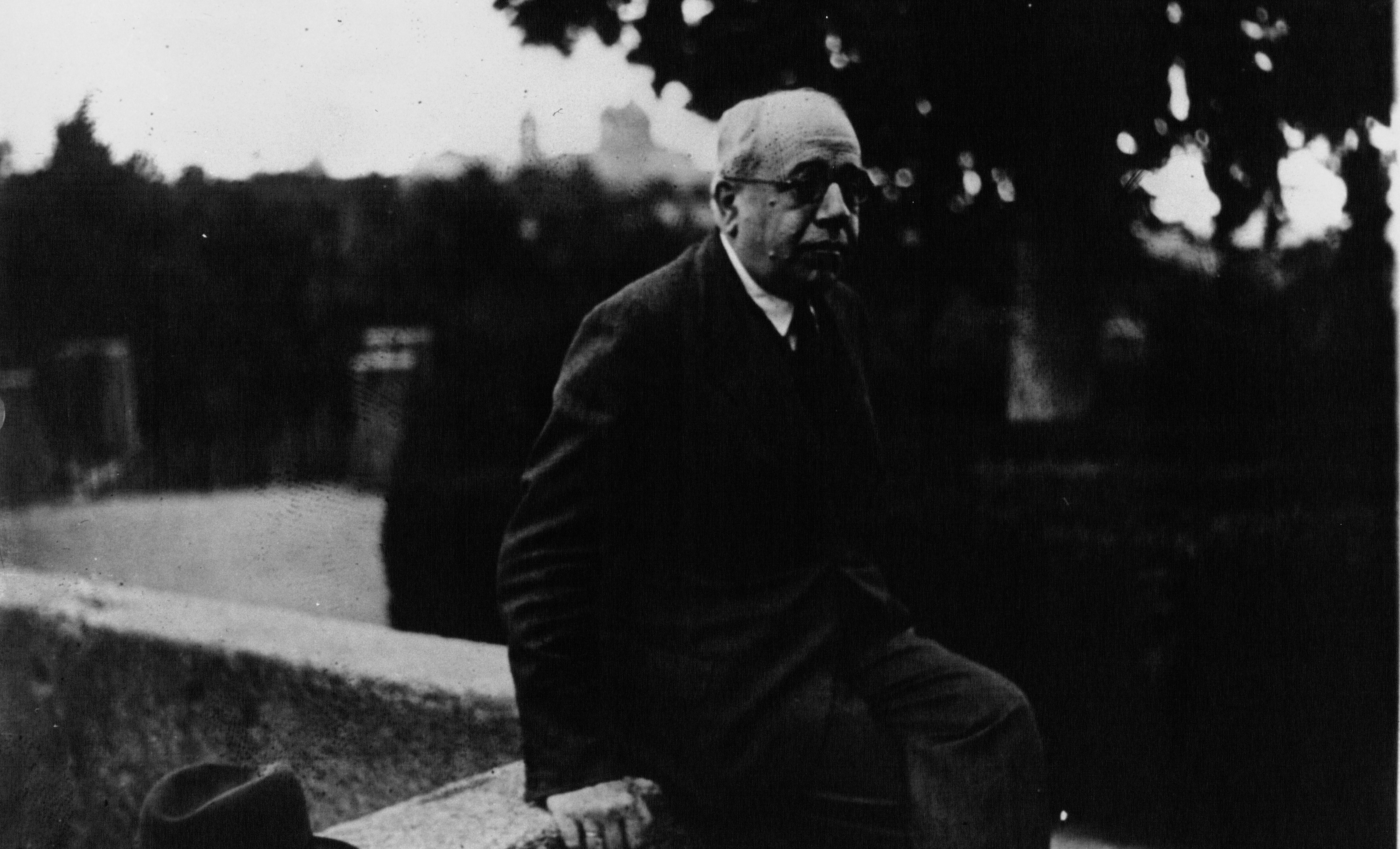 Manuel Azaña, pasando sus vacaciones en los jardines de Aranjuez, en 1932.